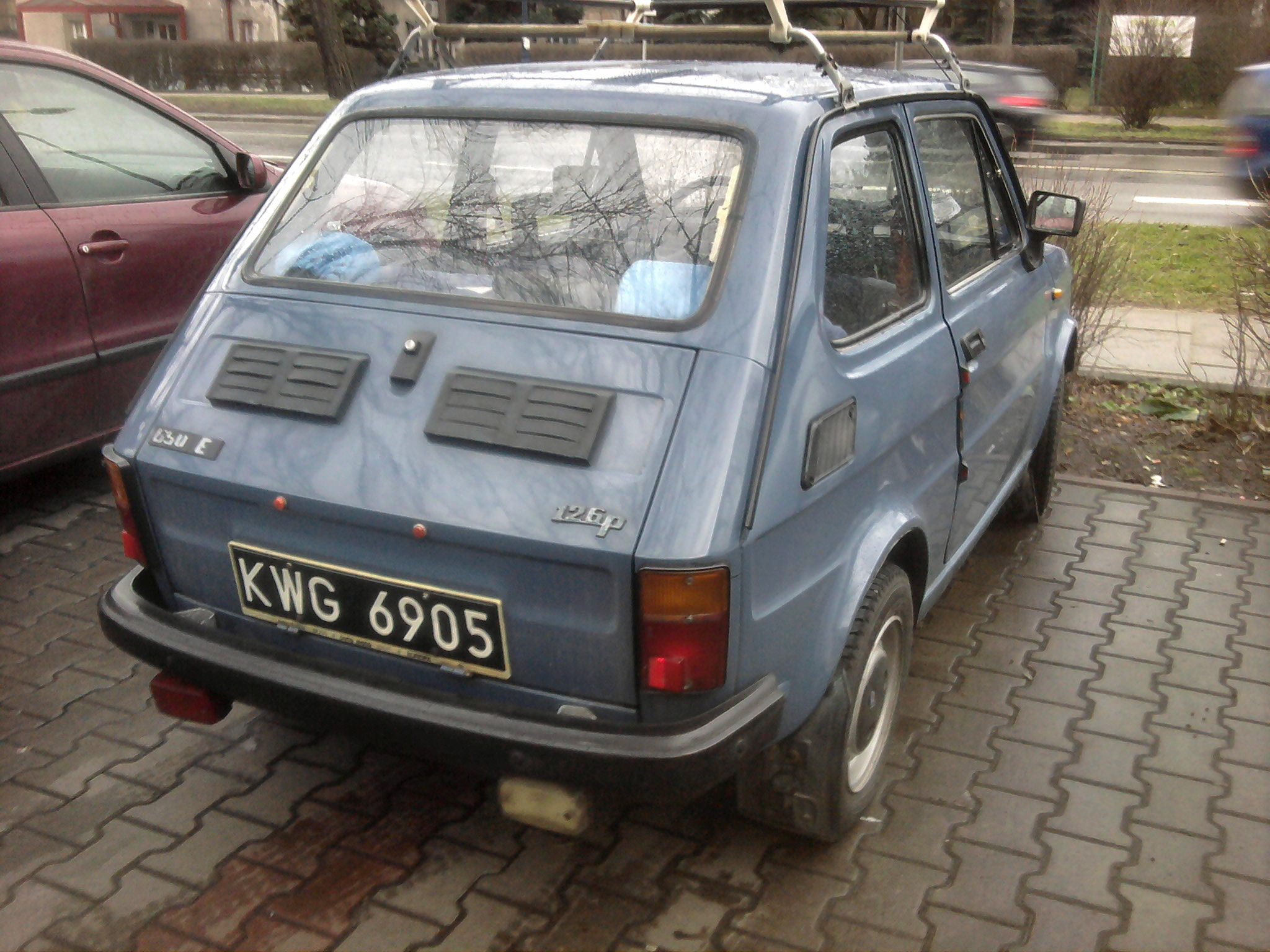 Polski Fiat 126p 650E